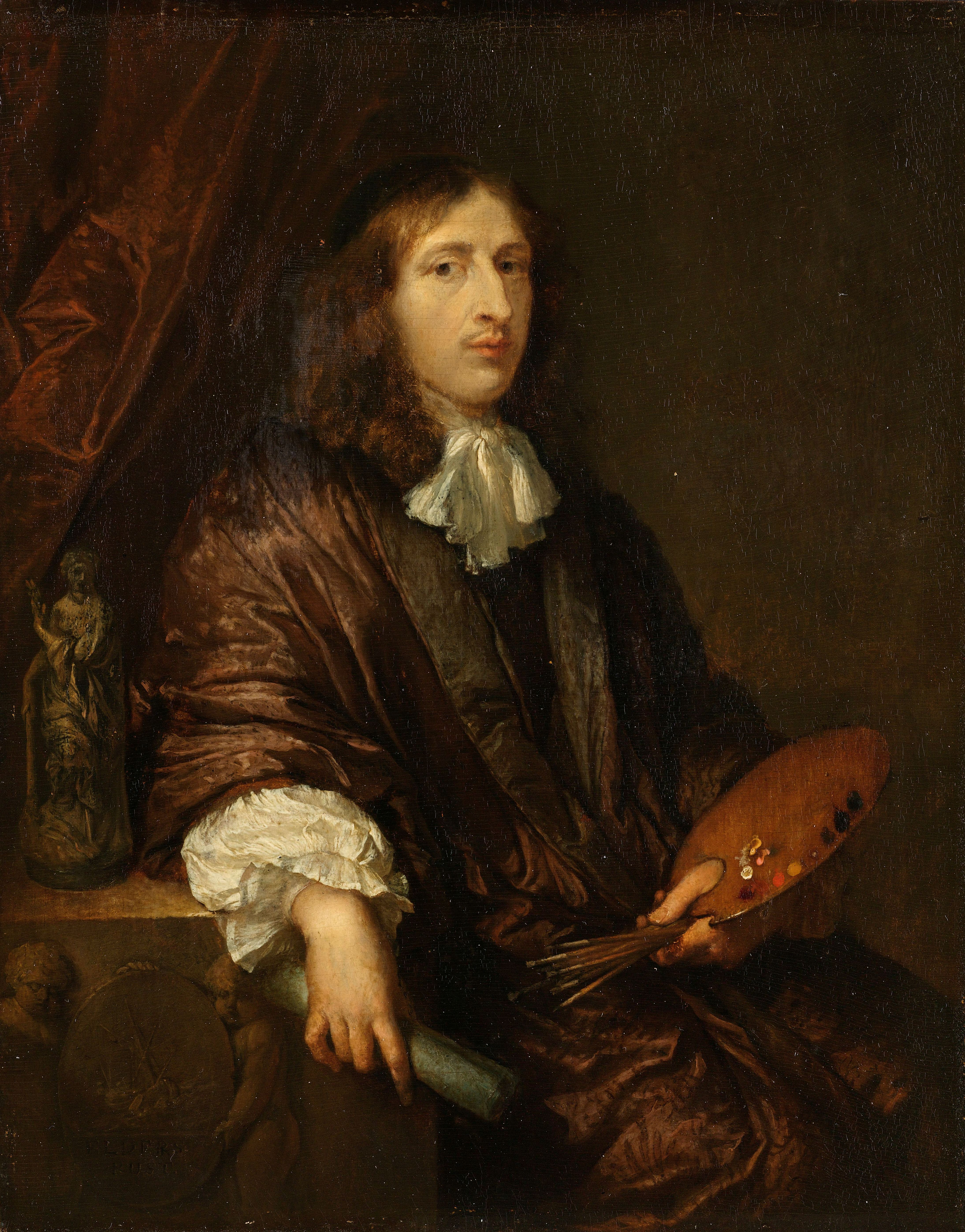 Zelfportret van de schilder Caspar Netscher. Kniestuk, zittend, een rol papier in de rechterhand, palet en penselen in de linker. Links een voetstuk met een reliëf van twee putti met een schild met een schuit, op de piedestal staat een beeldje.